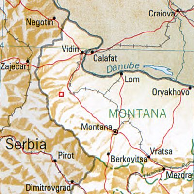 Belogradtschik - Lage des Ortes in Bulgarien